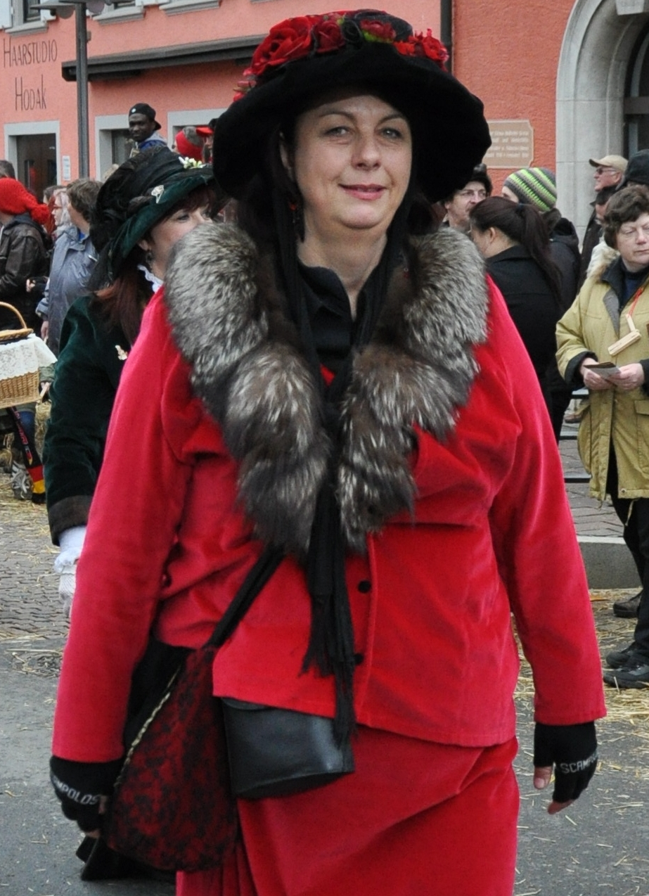 Althistorische Narrenzunft Narrhalla Hechingen; Narrenfigur: Die Alte Fotografiert beim Landschaftstreffen der Vereinigung Schwäbisch-Alemannischer Narrenzünfte (VSAN) 2014 in Tettnang; Narrensprung am Sonntag, 16. Februar 2014